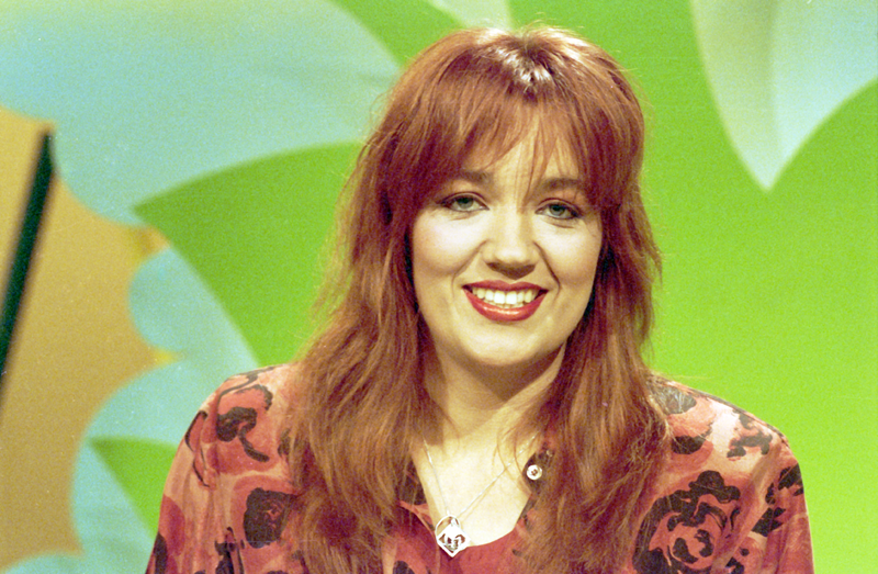 Birgit Gantzert, 1990, KRO, Archief Beeld en Geluid, Catalogusnummer 90925, kb5, fotonummer 28